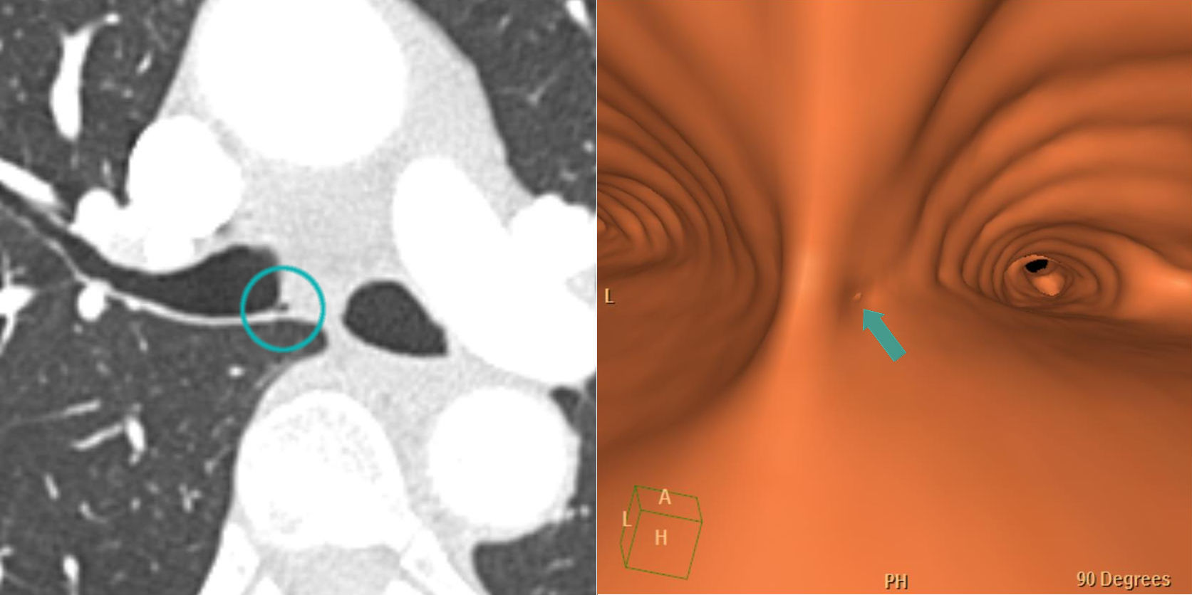 Kleines Bronchialdivertikel knapp unter der Carina am rechten Hauptbronchus. Linke Bildseite: axiale Computertomographie (Blick von unten:linke Körperseite rechts im Bild) Rechte Bildseite: Virtuelle Bronchoskopie mit CT-Daten (Blick von oben:rechte Körperseite rechts im Bild)